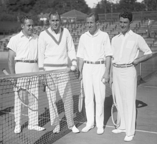 Um den Kampf des Davis-Pokals! Die amerikanische Tennismannschaft von links nach rechts: Hunter, Tilden, Allison, van Ryn. auf dem Tennisplatz Rot-Weiss in Berlin-Grunewald.